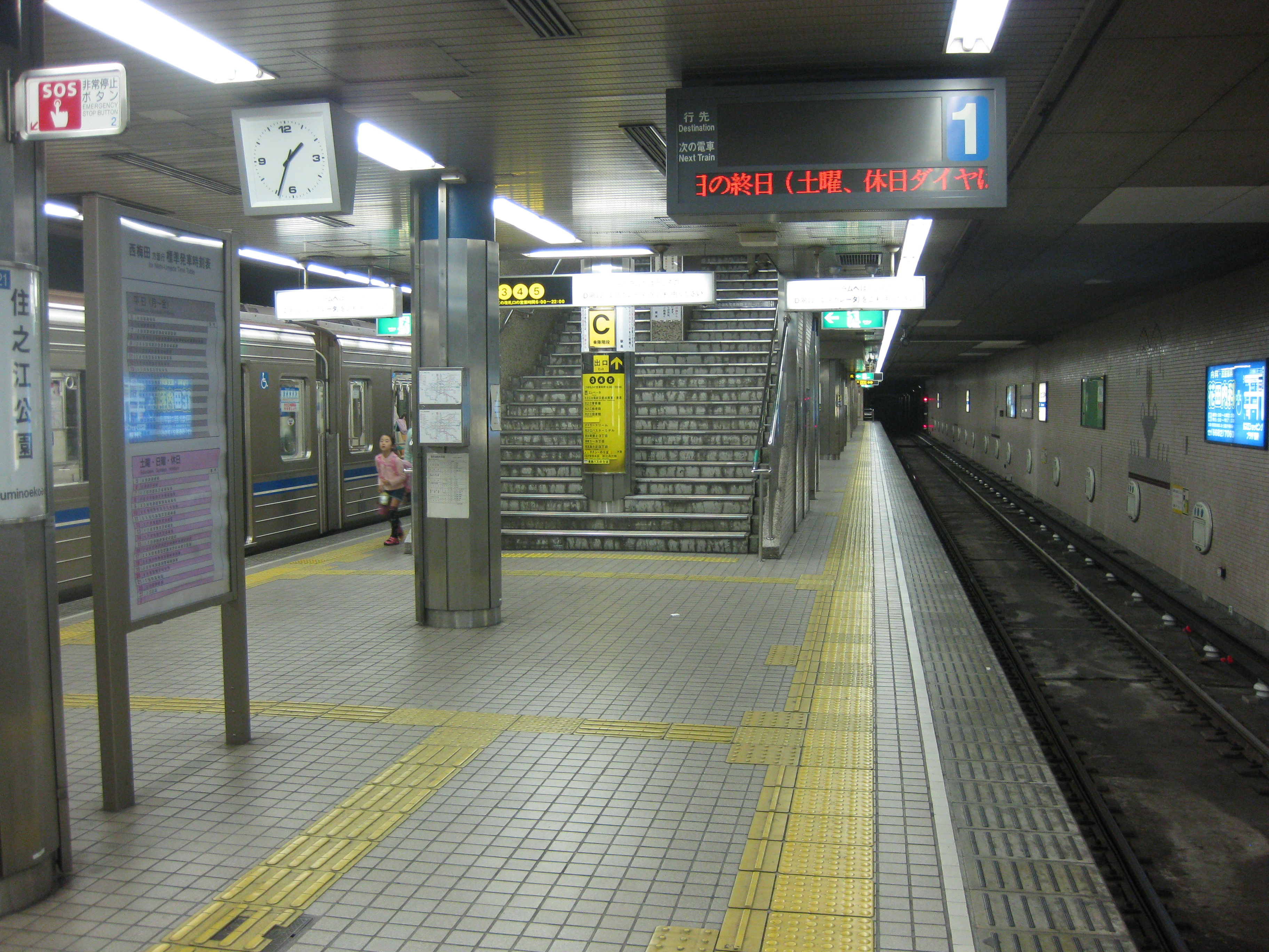 住之江公園駅地下鉄プラットホーム